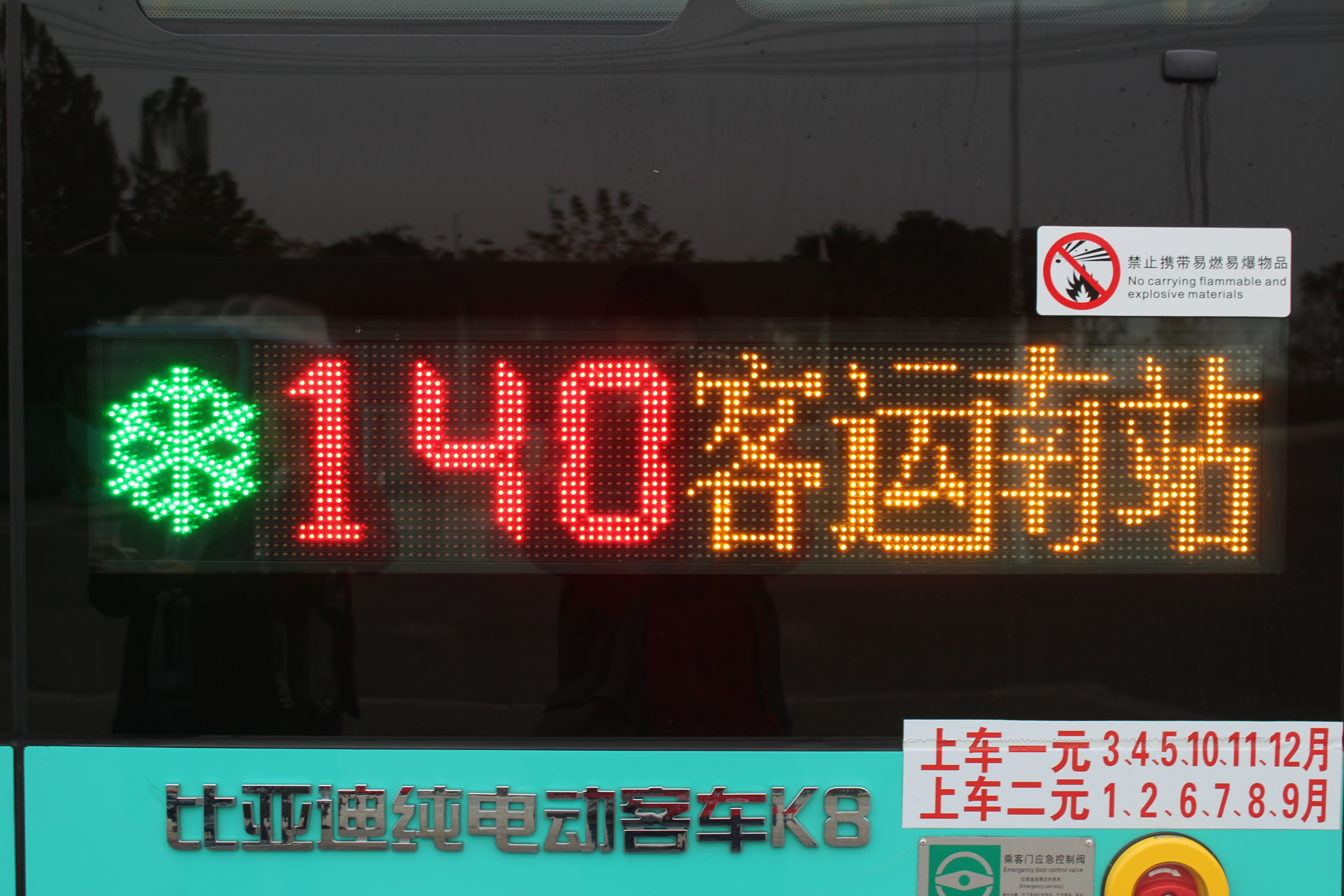 中文（中国大陆）: Bengbu Bus No.140 LED plate